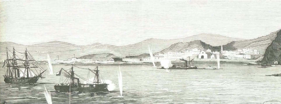 Guerra del pacifico. Arica (Perú), combate sostenido el 27 de febrero por el monitor peruano "Manco Capac" contra los buques chilenos "Huascar" y "Magallanes".